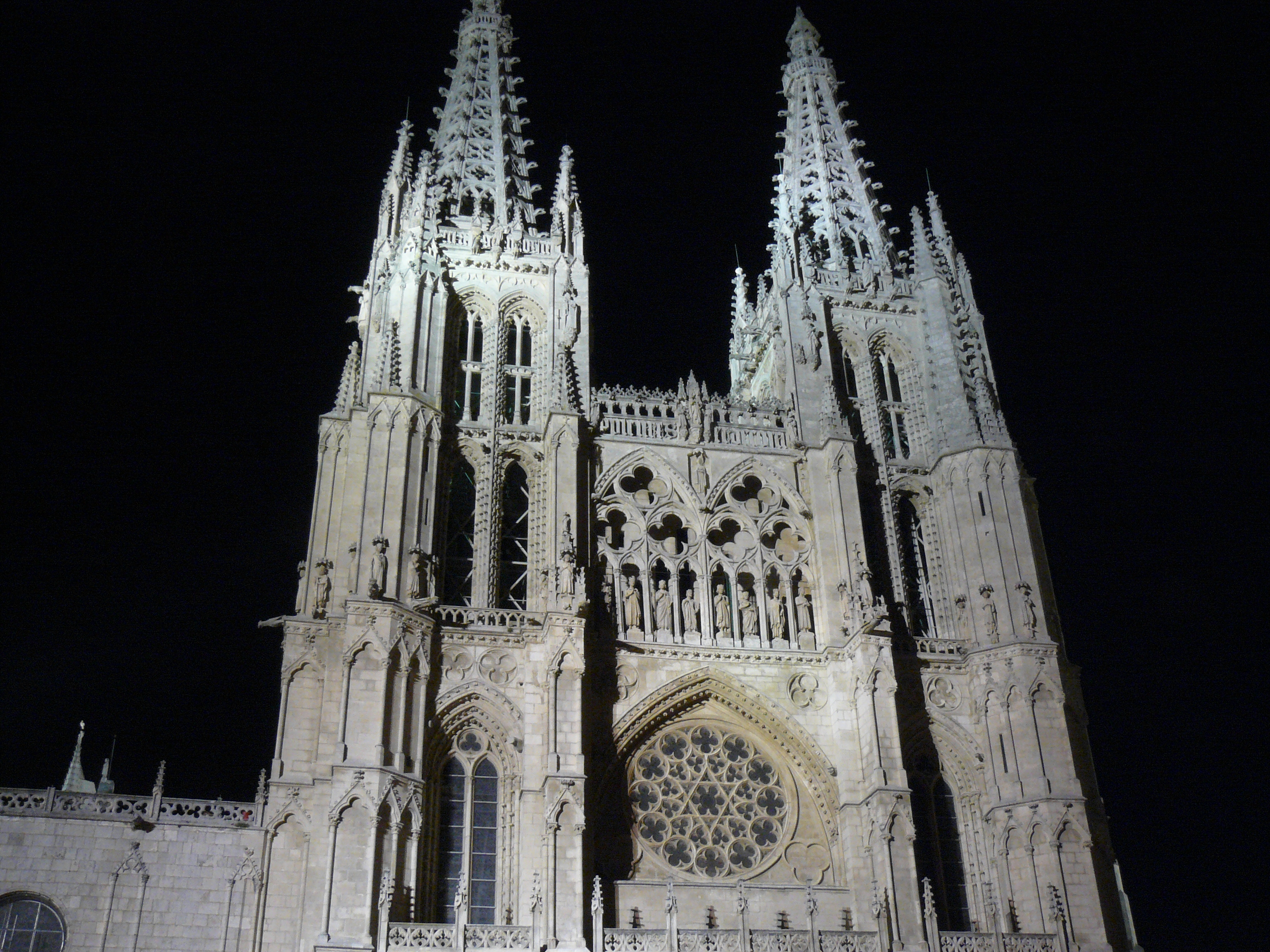 Catedral de Burgos, Burgos.